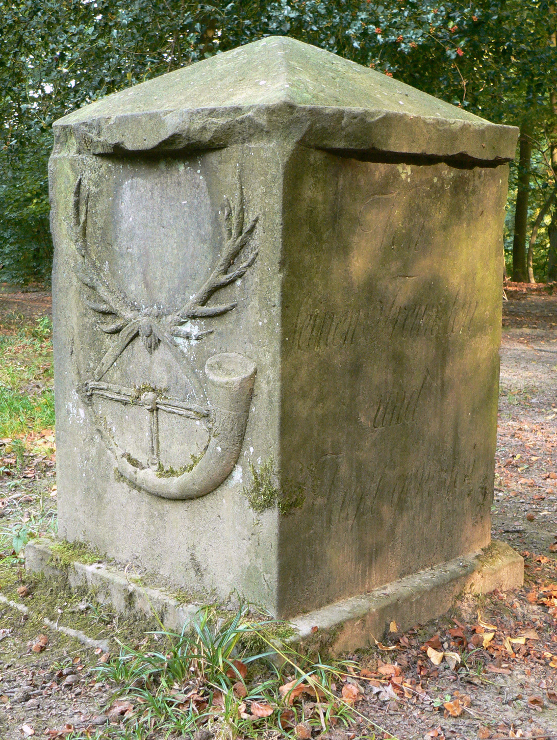 Toppius Stein